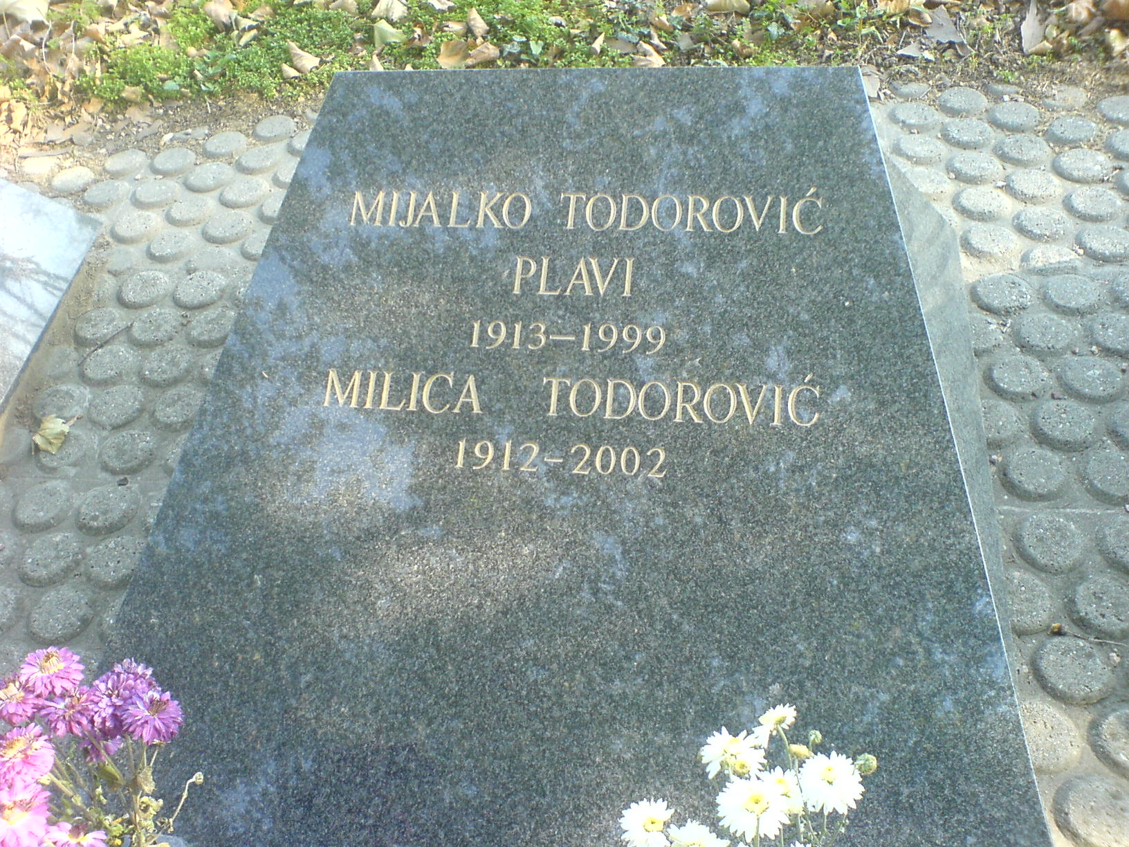 Grob Mijalka Todorovića.